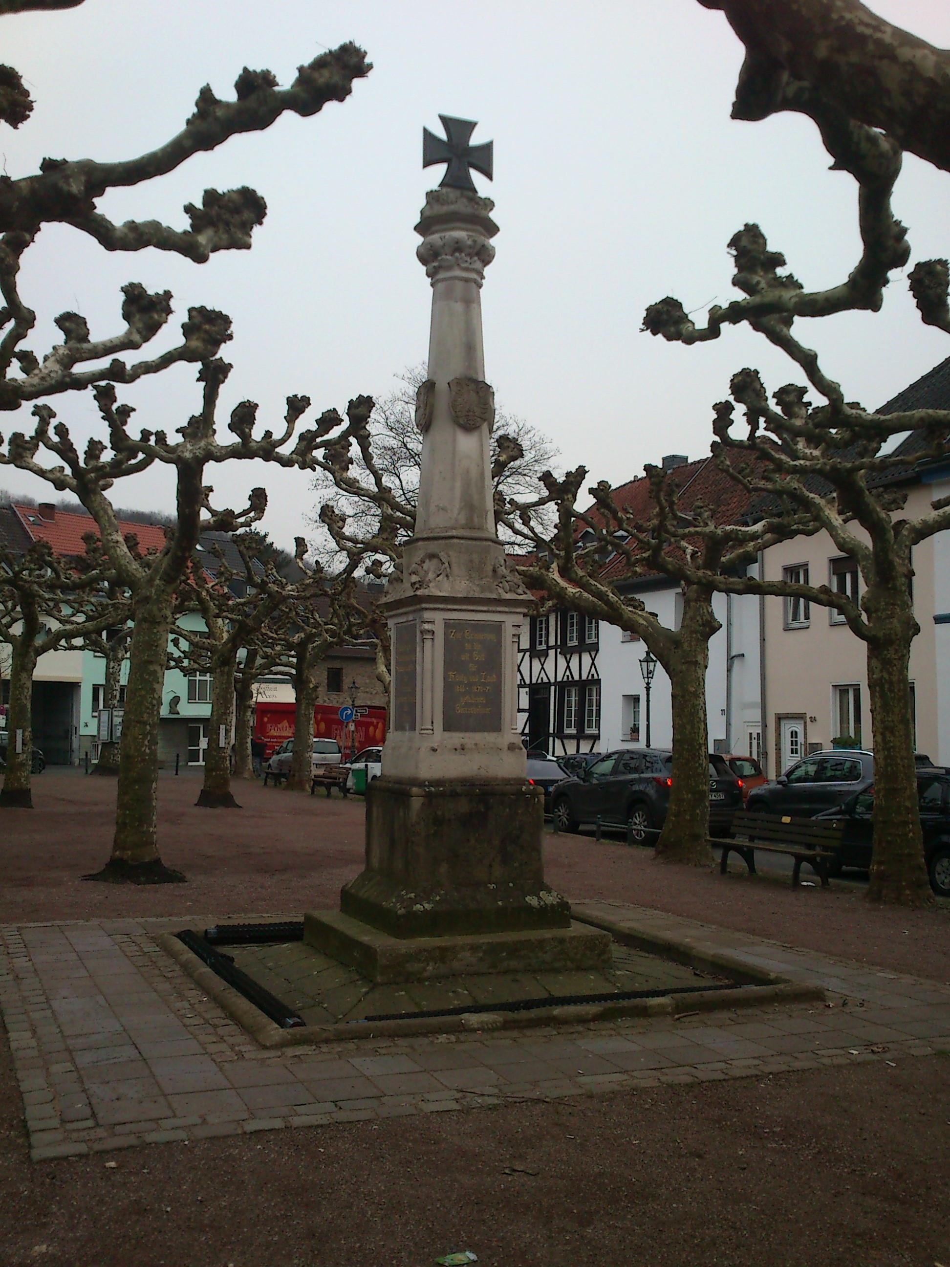 Gefallenenmal der Kriege 1866 und 1870-71